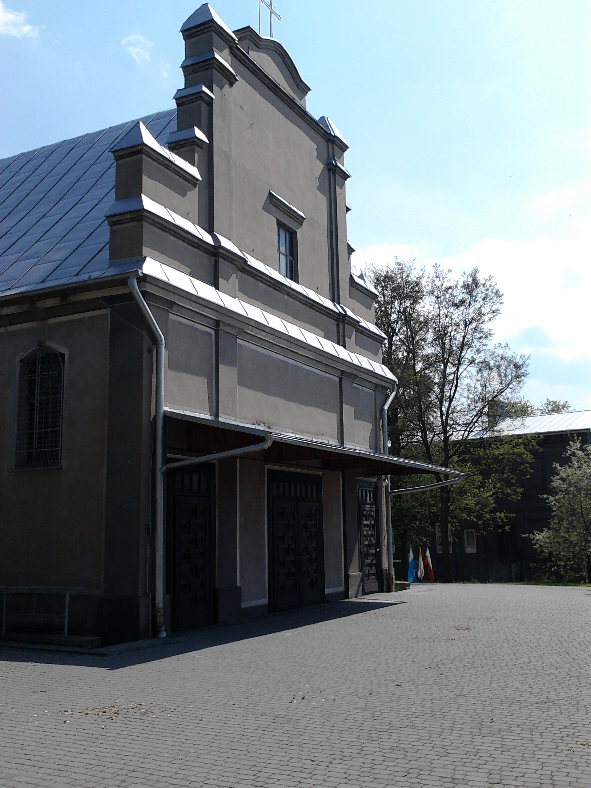 Fasada kościoła parafialnego w Moszczenicy w powiecie piotrkowskim